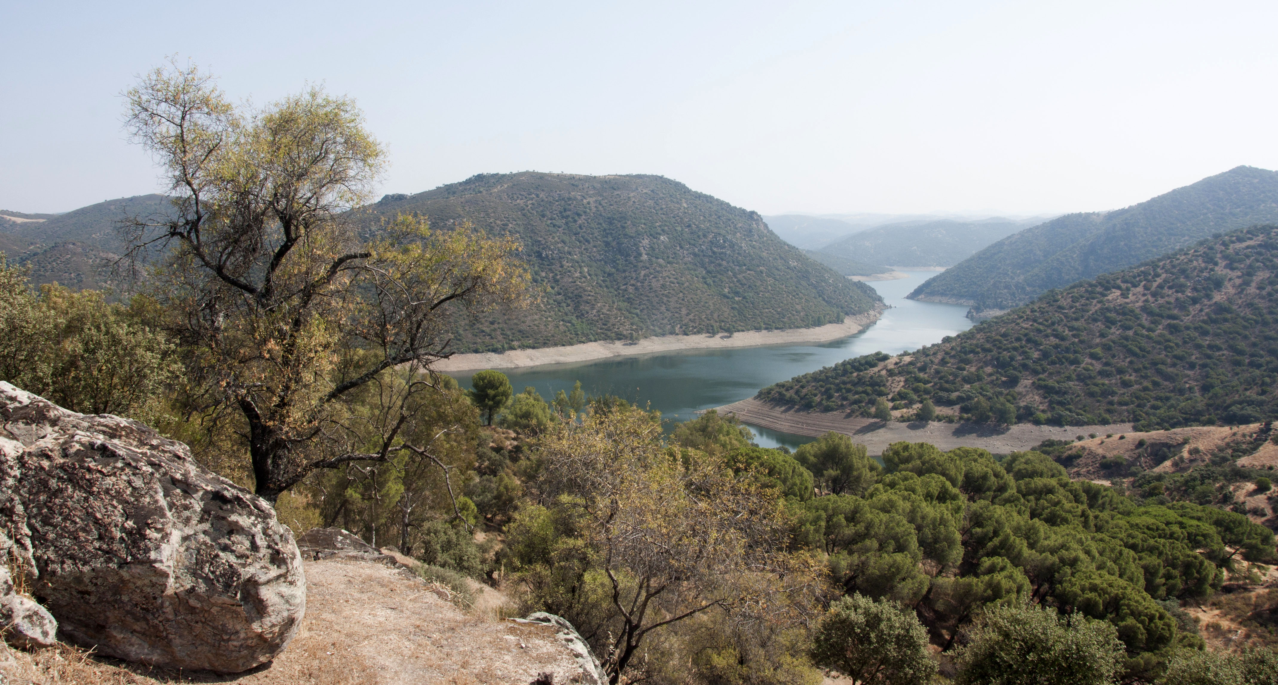 Parque Natural de la Sierra de Andújar. This is a photography of a Site of Community Importance in Spain with the ID: ES6160006. Natura2000 entry, EEA entry